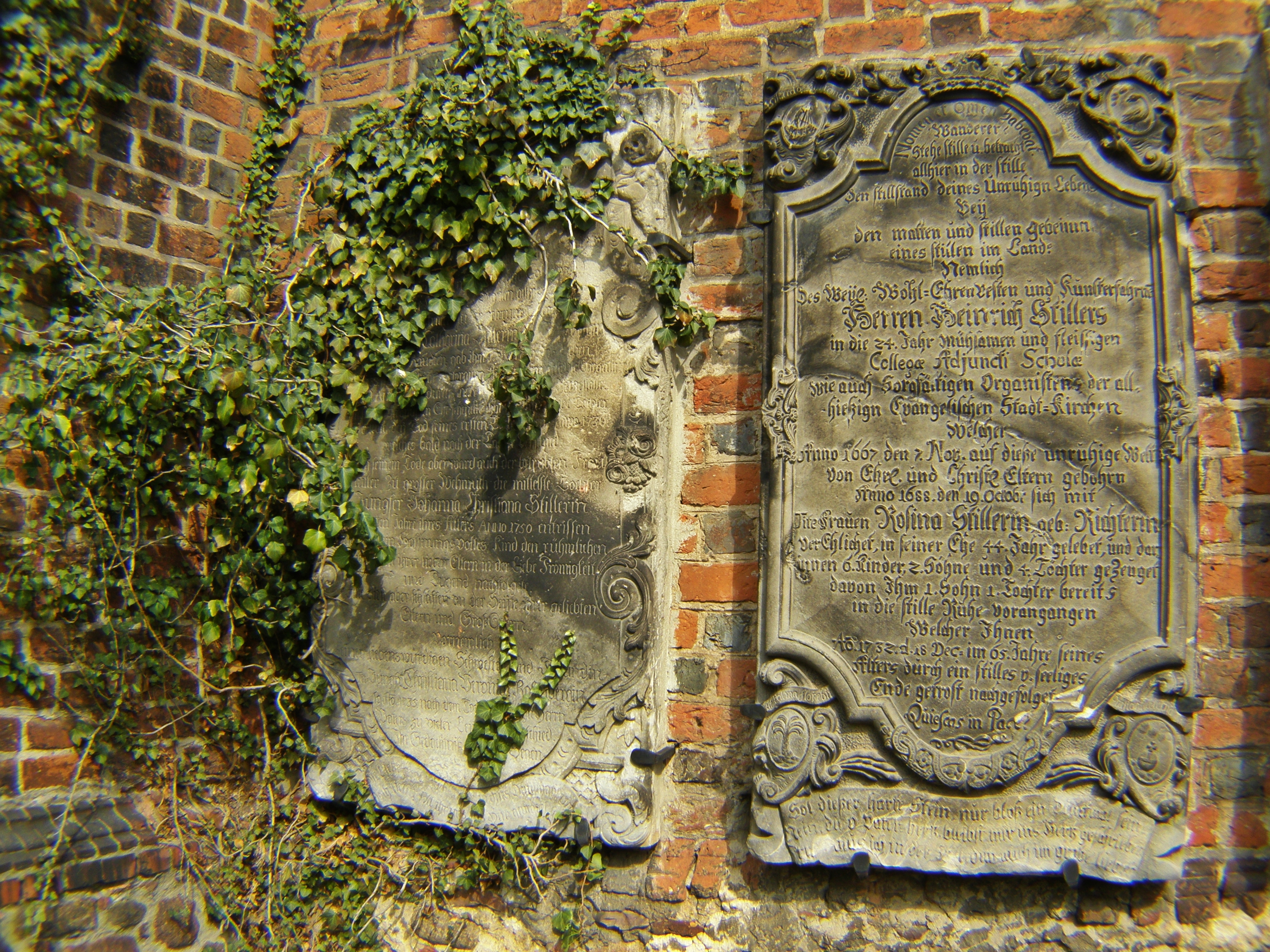 Rudna, kościół p.w. św. Katarzyny, ob. prawosławny, XV, XVIII